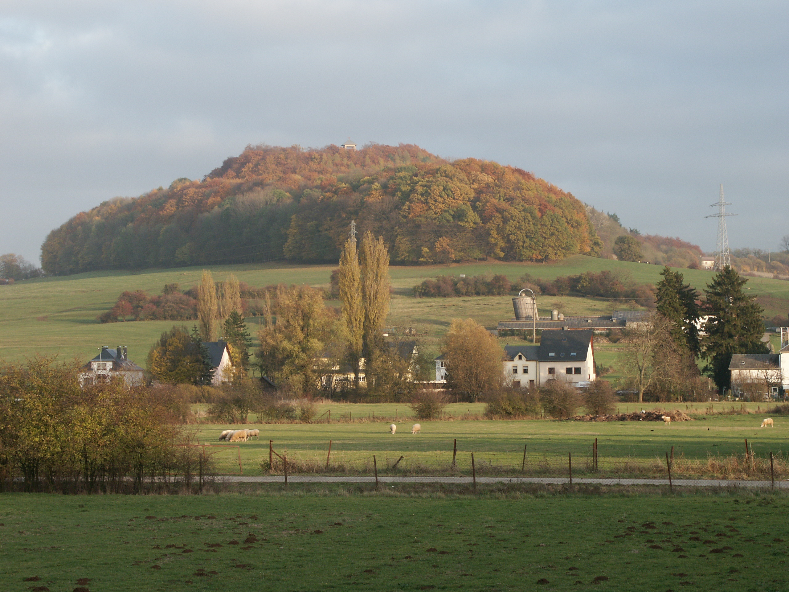 Gehaansbierg vu Käl aus gesinn